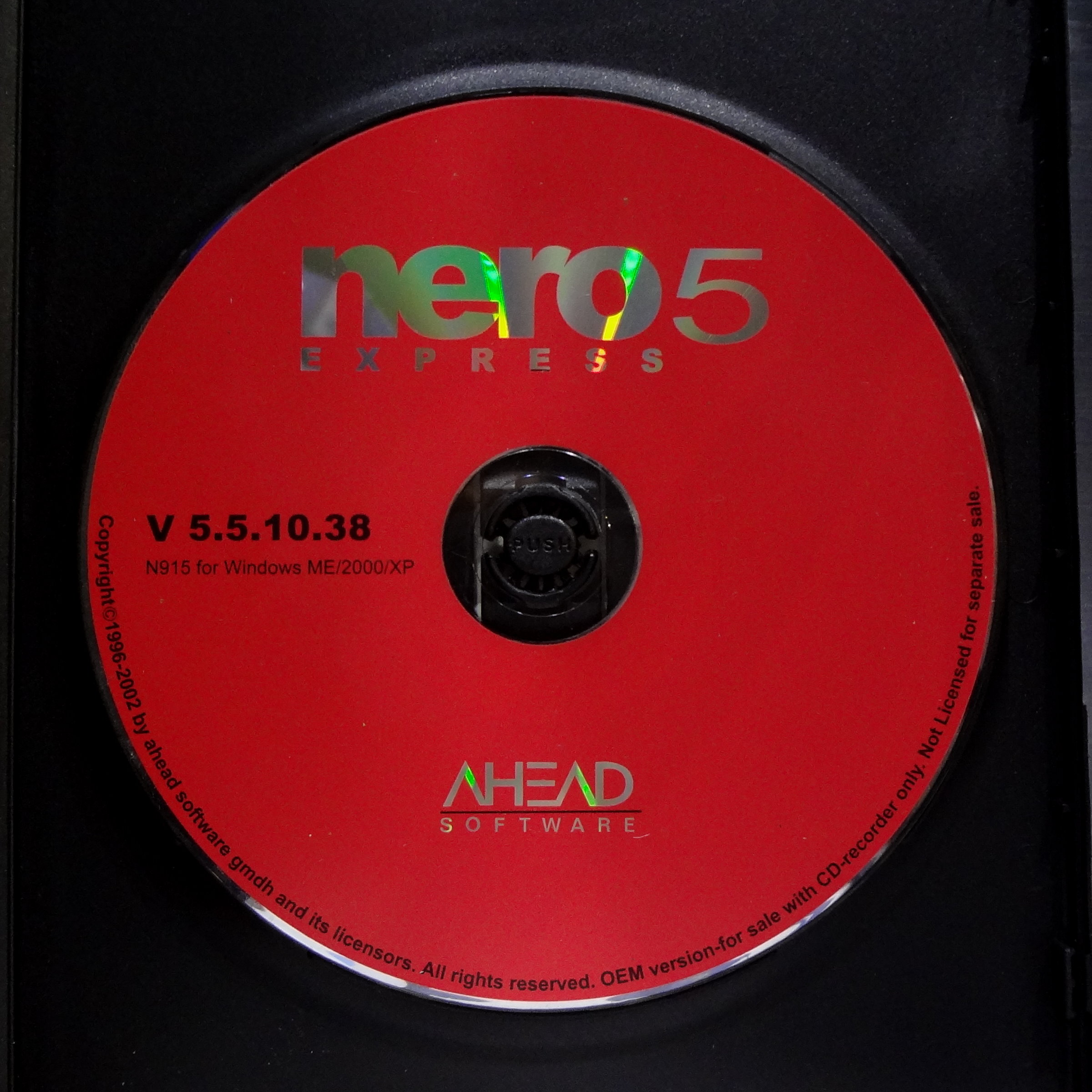 Nero Express 5.5.10.38 OEM版，隨CD燒錄機附贈。